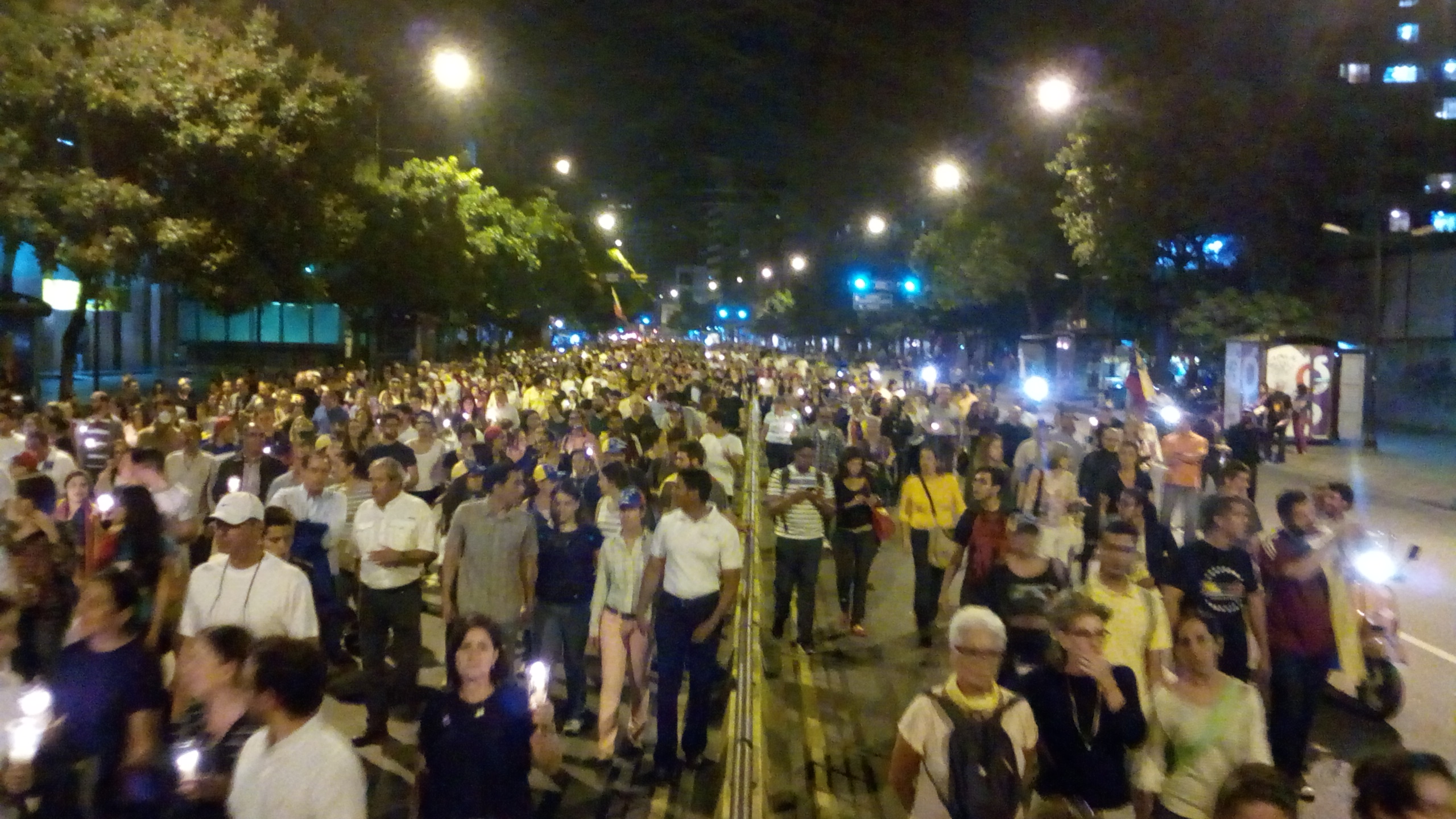 Marcha nocturna en memoria a Neomar Lander el 8 de junio de 2017 en Caracas.